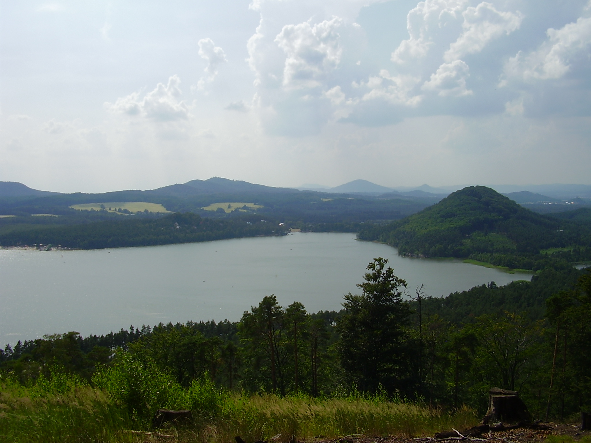 Lake Máchovo jezero